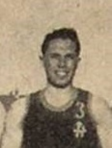 cestista italiano Licensing Paganella